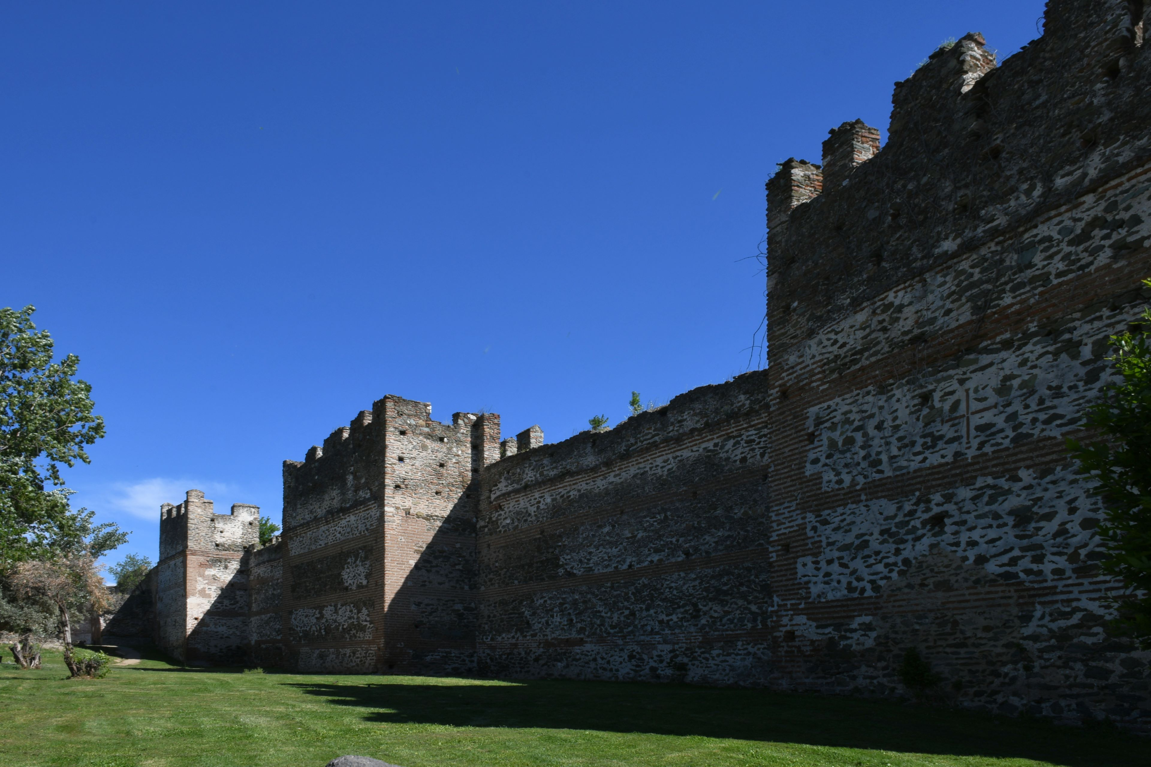 Thessaloniki, Nördliche Stadtmauer (Τείχη της Θεσσαλονίκης) (4. Jhdt.)